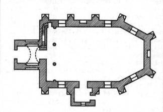 Гнезна. План касцёла